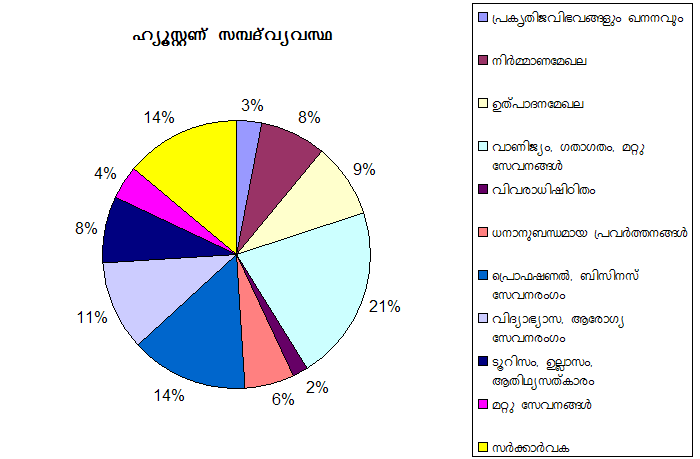 ഹ്യൂസ്റ്റൺ സമ്പദ്‌വ്യവസ്ഥ